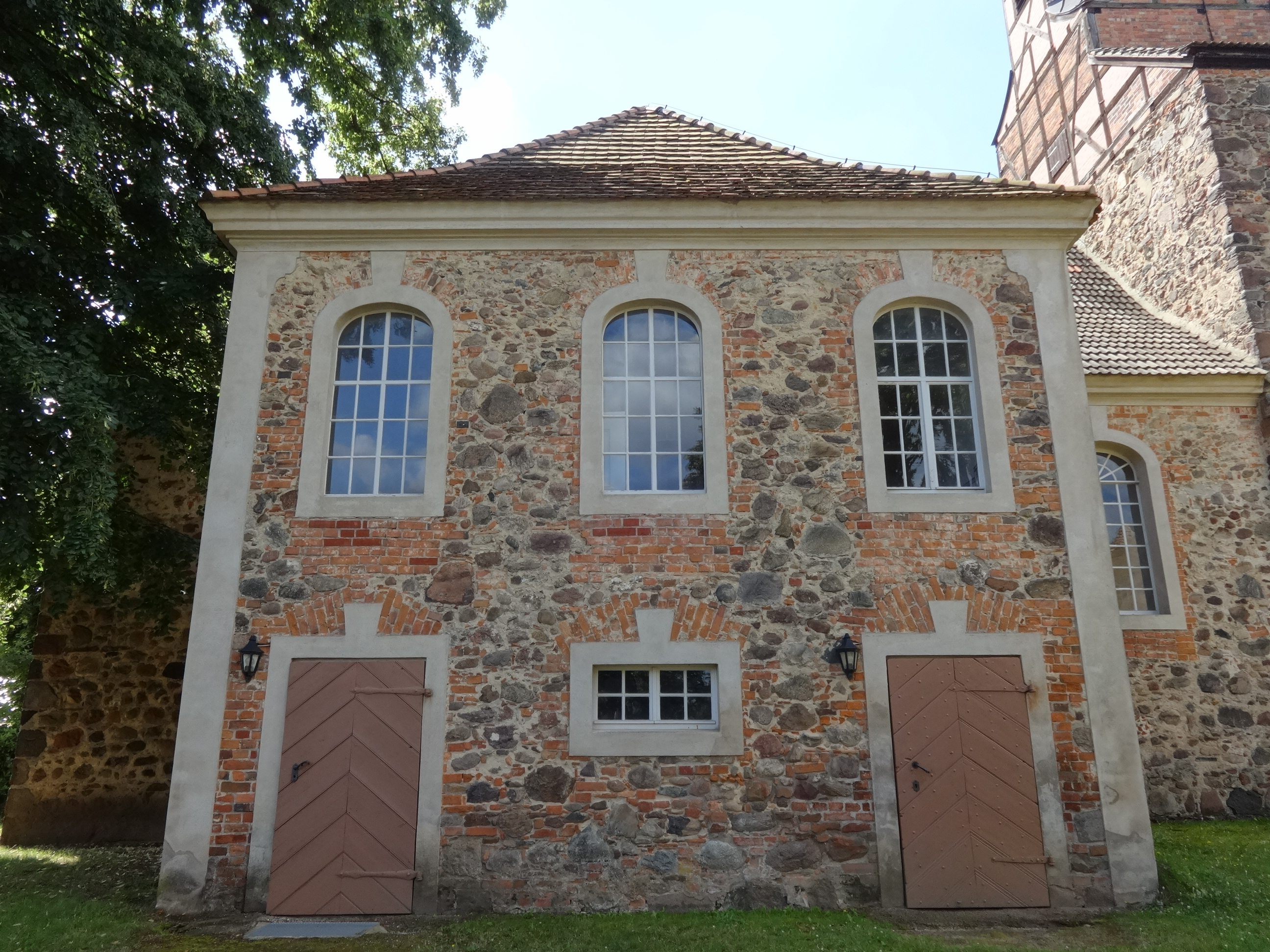 Die Dorfkirche Uckro ist ein Feldsteinkirche, die vermutlich Ende des 14., Anfang des 15. Jahrhunderts entstand. Im ersten Drittel des 18. Jahrhunderts baute die Kirchengemeinde eine barocke Patronatsloge an. Im Innern befinden sich unter anderem ein Altarretabel, das um 1700 entstand. Es zeigt in der Predella das Abendmahl Jesu und in seinem durch Weinlaubsäulen in drei Feldern gegliedertem Hauptbild die Kreuzigung Christi, flankiert von Geburt und Auferstehung Jesu Christi. Oberhalb des Hauptbildes ist die Himmelfahrt zwischen zwei Engeln mit Leidenswerkzeugen dargestellt. Das Werk schufen der Calauer Kunsttischler Georg Wolschke sowie der Lübbener Fassmaler Michael Scharbe.